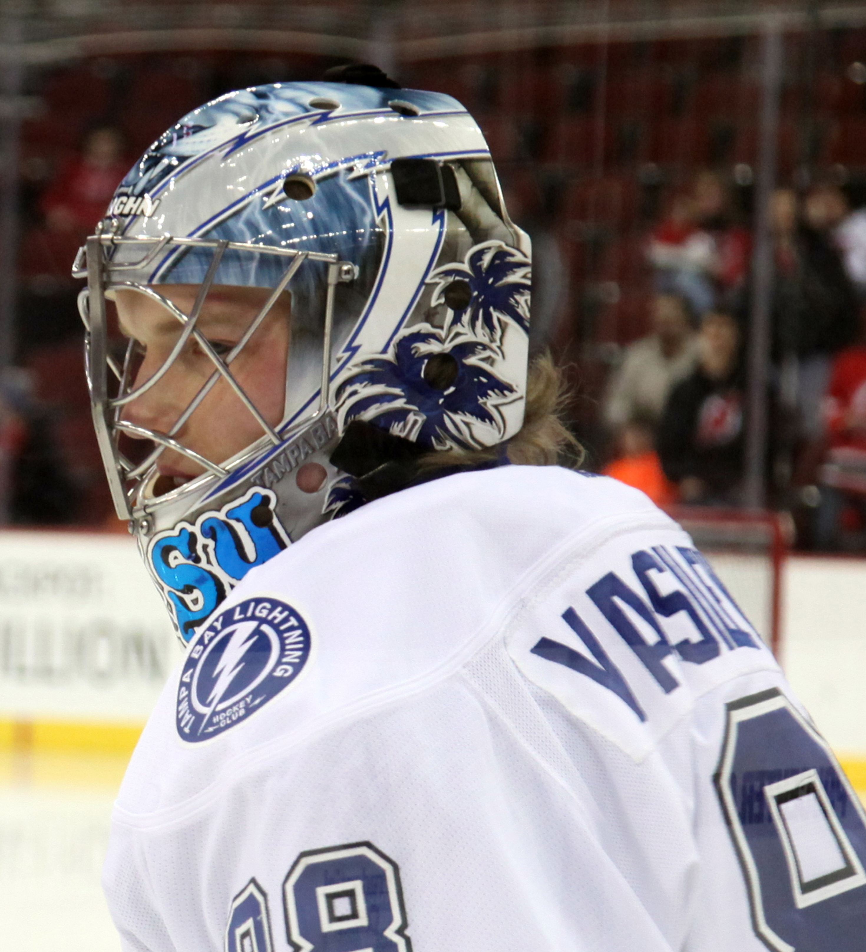 Andrei Vasilevskiy in December 2014.